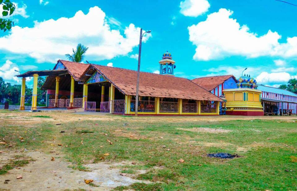 உச்சில் புவனேஸ்வரி அம்மன் ஆலயம்